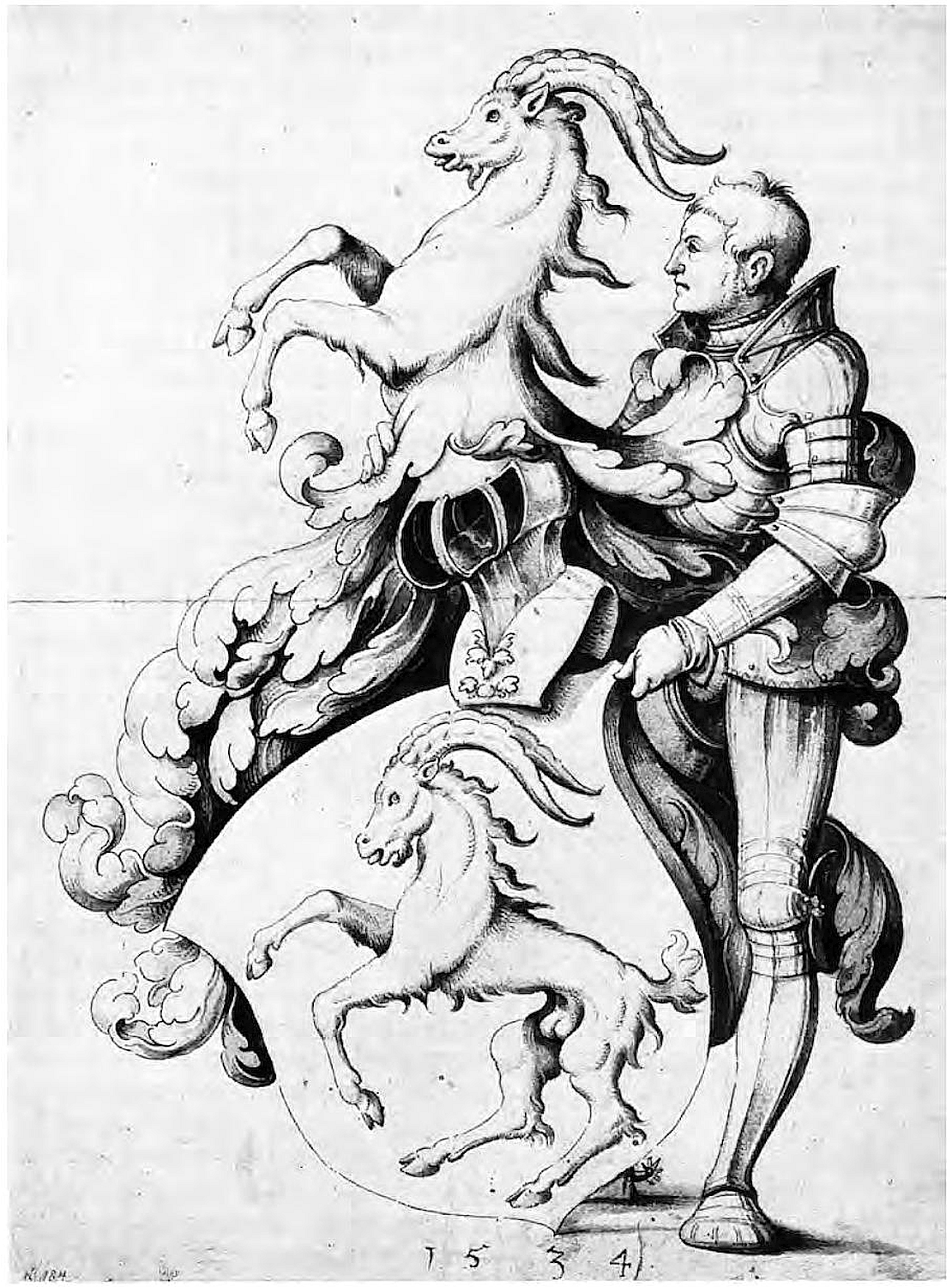 Bilder aus Freiburg, Tour am 24.02.2018